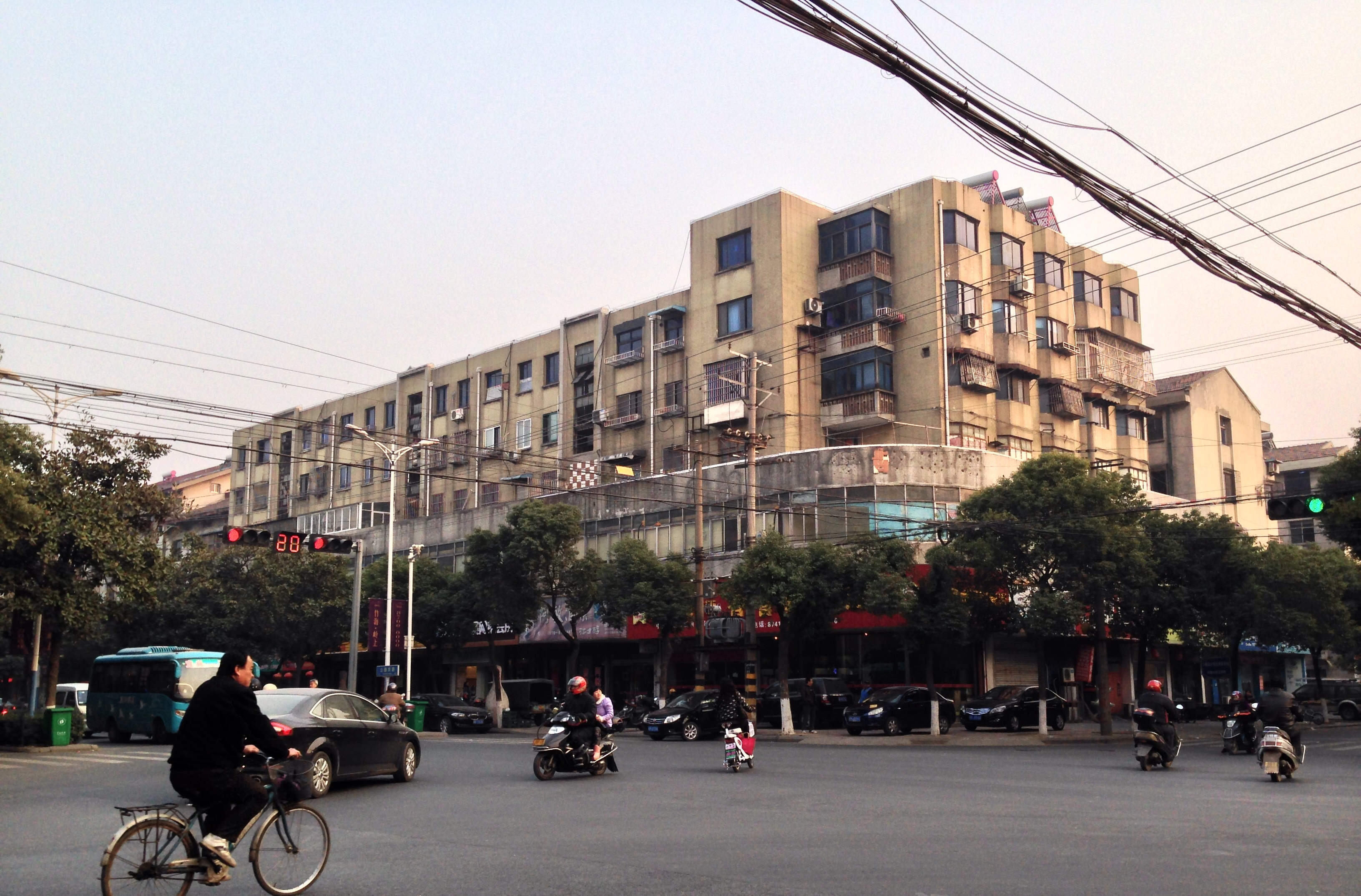 宜兴市丁蜀镇白宕路十字路口